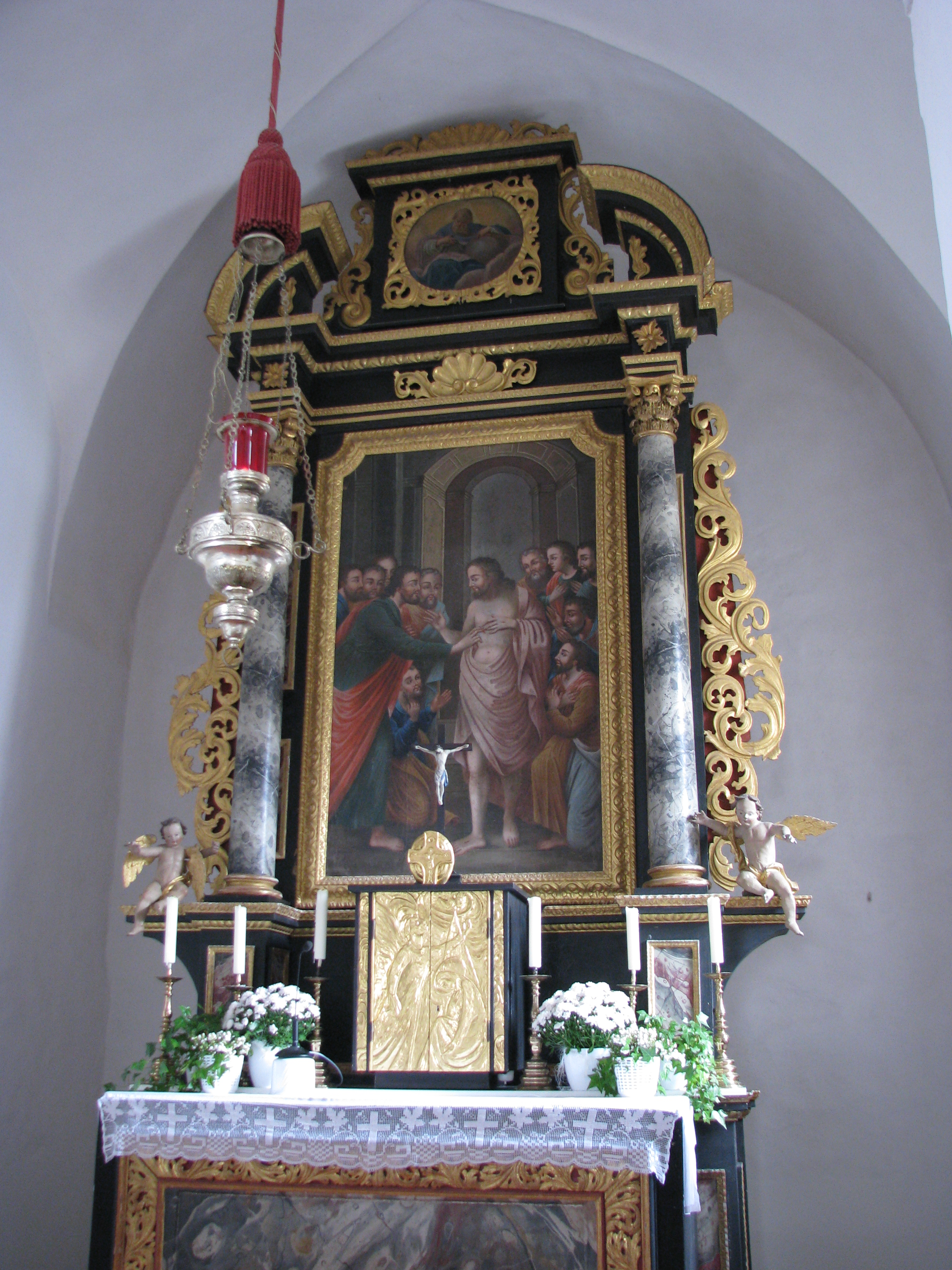 Landerzhofen, Ortsteil von Greding im Landkreis Roth, Filialkirche St. Thomas, Hochaltar